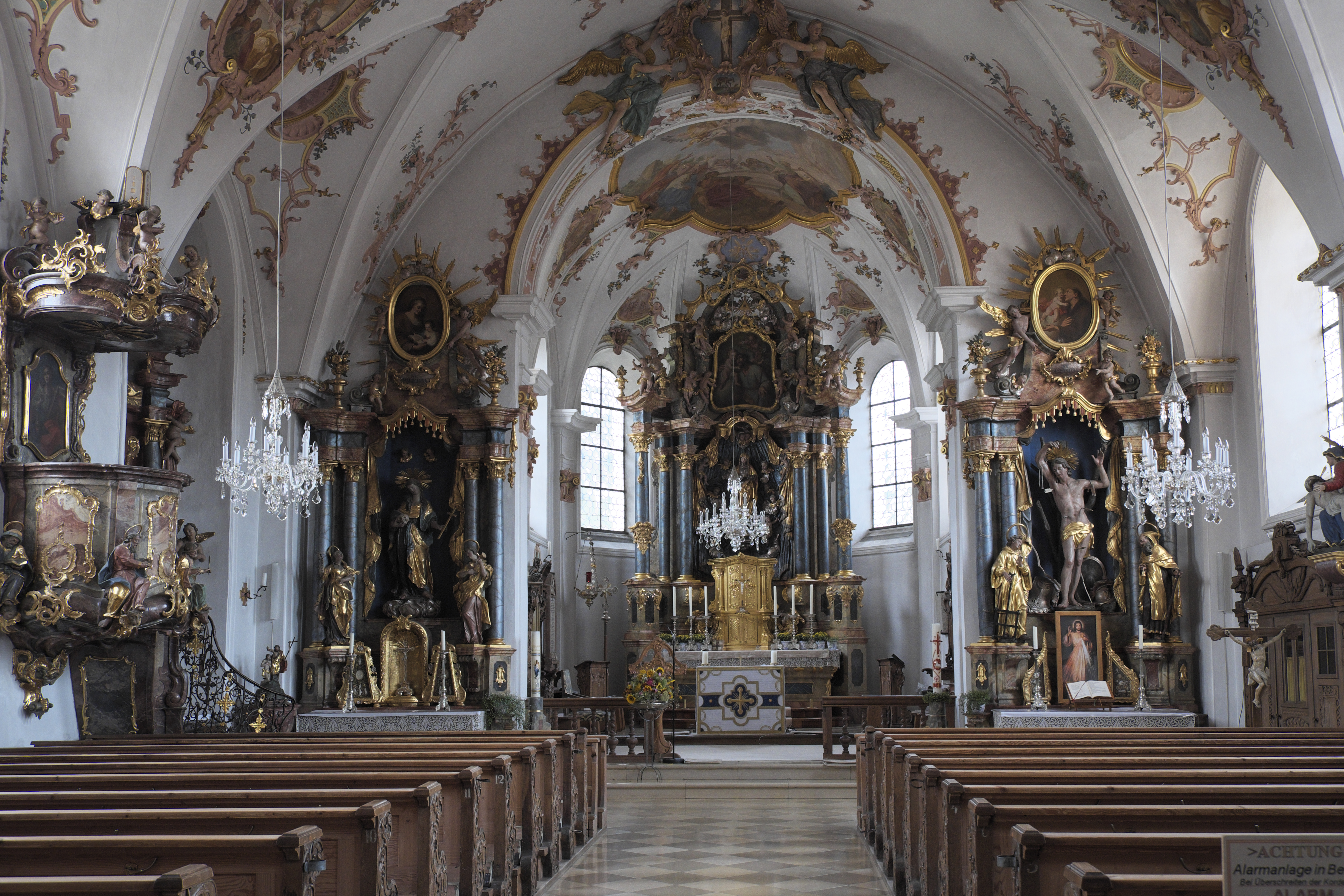 Katholische Pfarrkirche Mariä Himmelfahrt in Walleshausen, einem Ortsteil von Geltendorf im Landkreis Landsberg am Lech (Oberbayern/Bayern), Innenraum